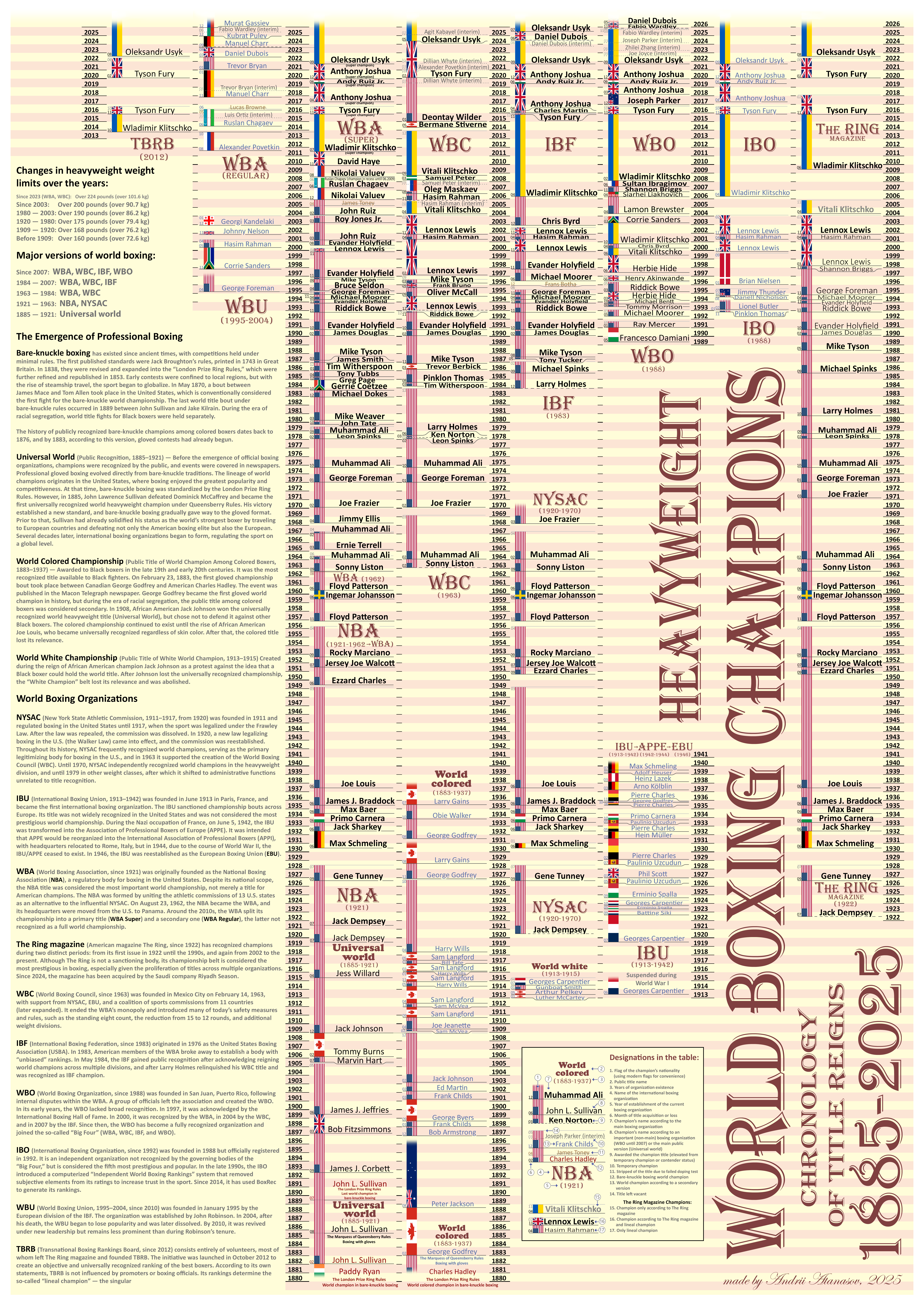 Список Чемпионов мира по боксу в тяжелом весе. (10.10.2013) Список доработанный. Изначальный вариант загружен автором: User:Fremantleboy (08.07.2007)